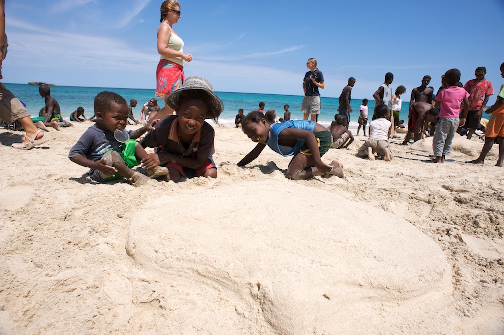 Andavadoaka